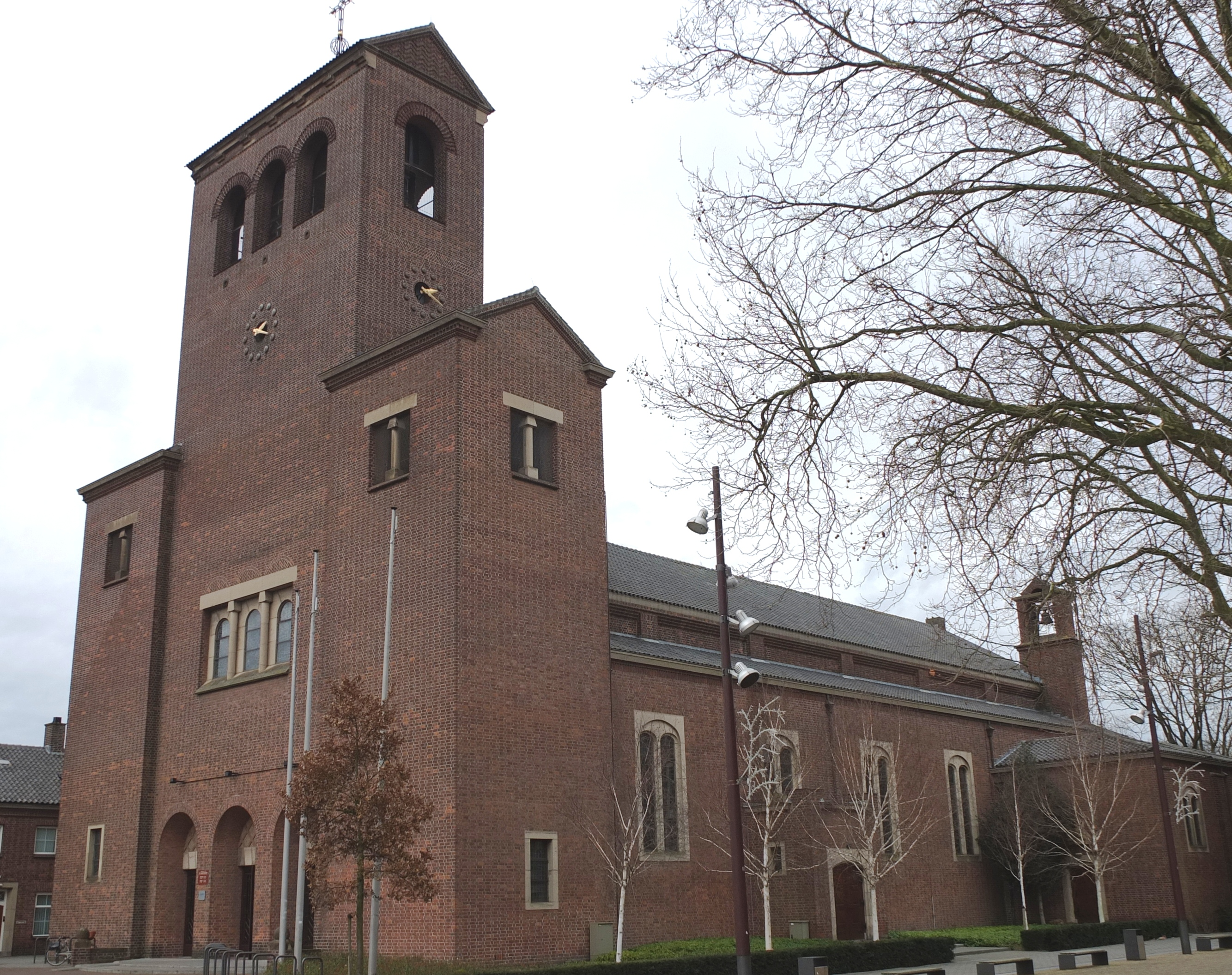 Zicht op deel van de Sint-Lambertuskerk in het centrum van Drunen